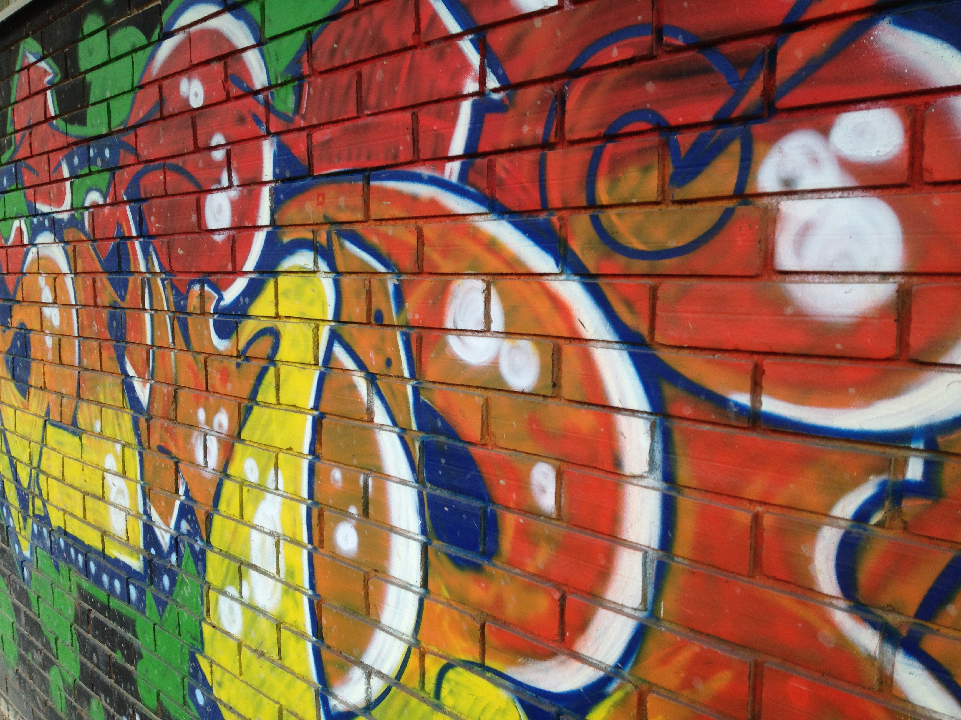 Во Орце секој може слободно да си ја изрази својата уметност.